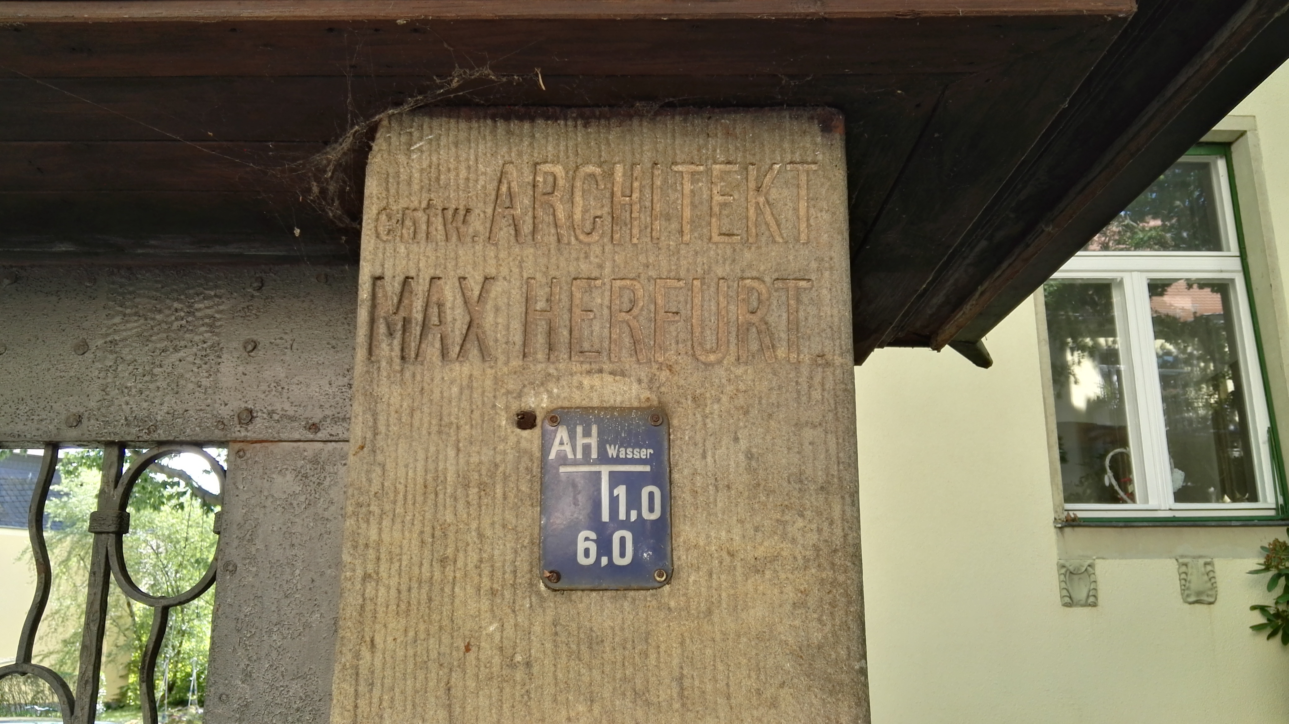 „Bautensignatur“ am Wohnhaus Pohlandstraße 15 in Dresden-Striesen; erbaut 1905-1906 nach Entwurf des Architekten Max Herfurt; unter Denkmalschutz